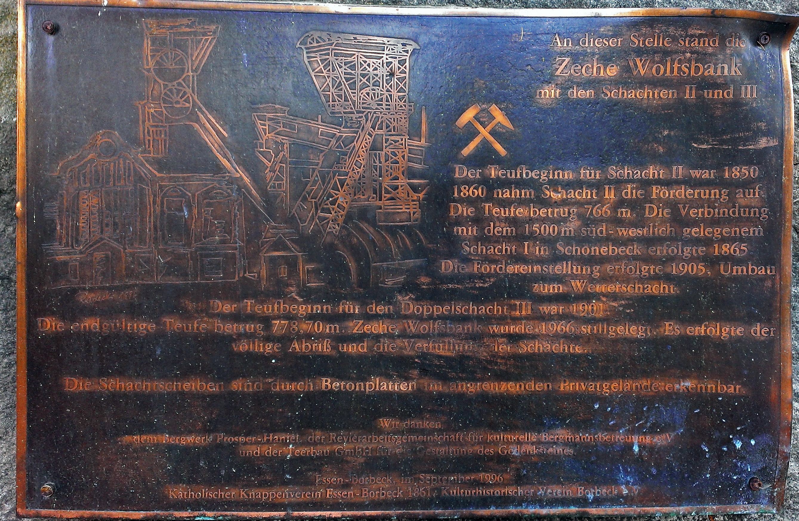 Gedenktafel zur Zeche Wolfsbankring in Essen-Bochold